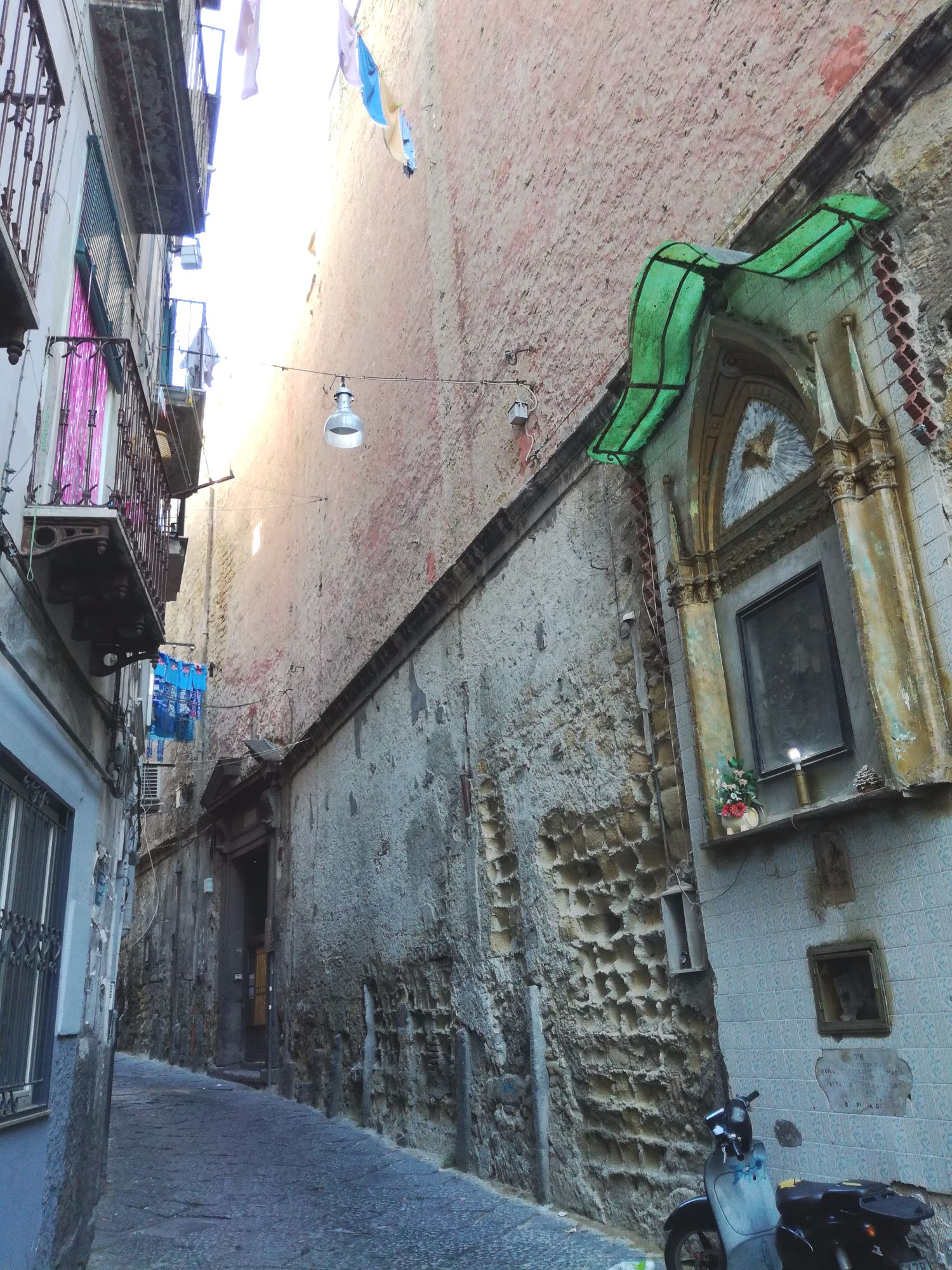 Le mura del convento di Santa Maria di Gerusalemme (Napoli)